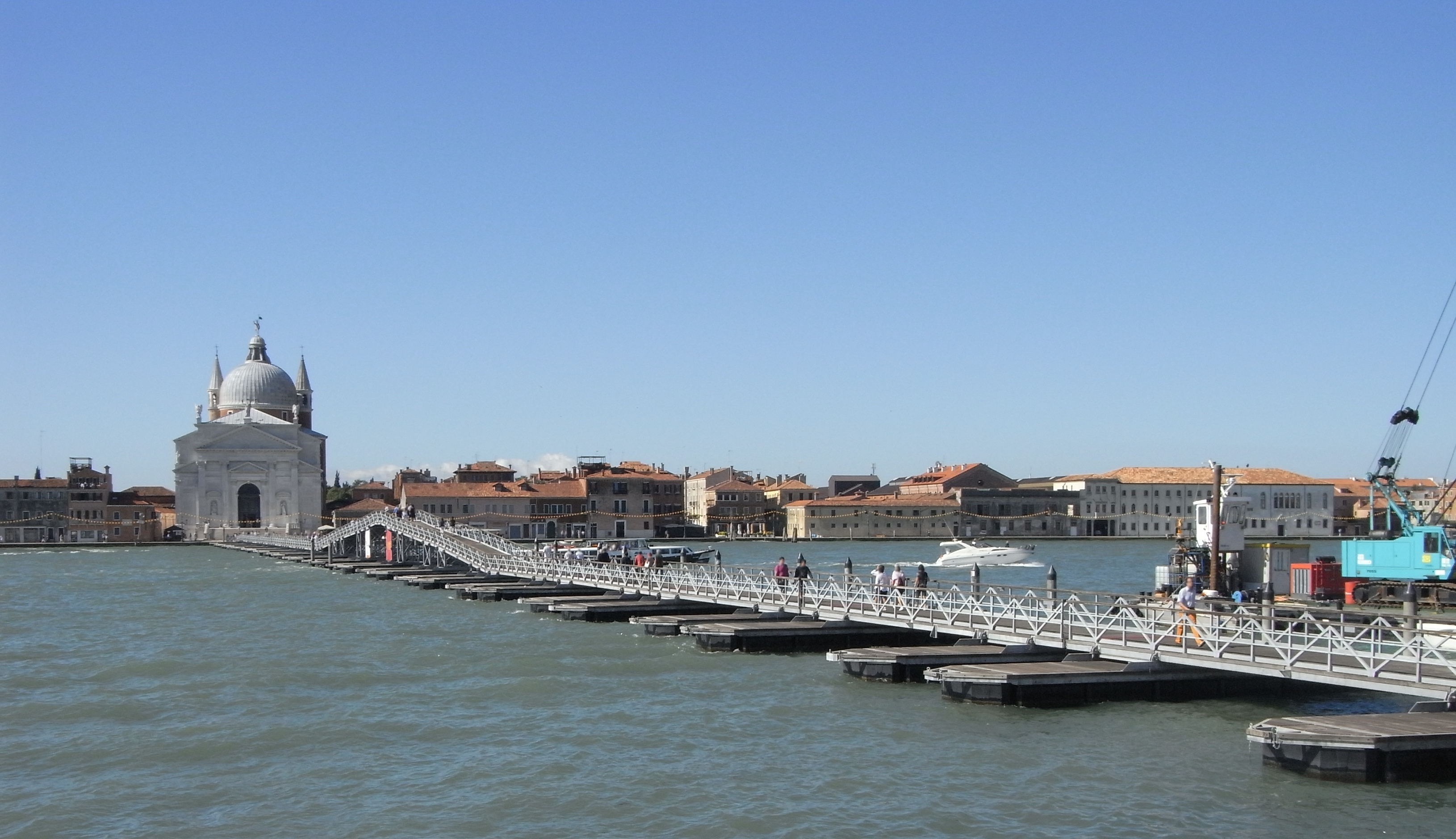 Erlöserfest in Venedig, die Erlöserkirche mit der Schwimmbrücke